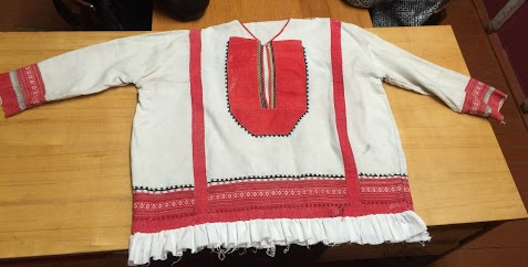 Навершик с.Чермные